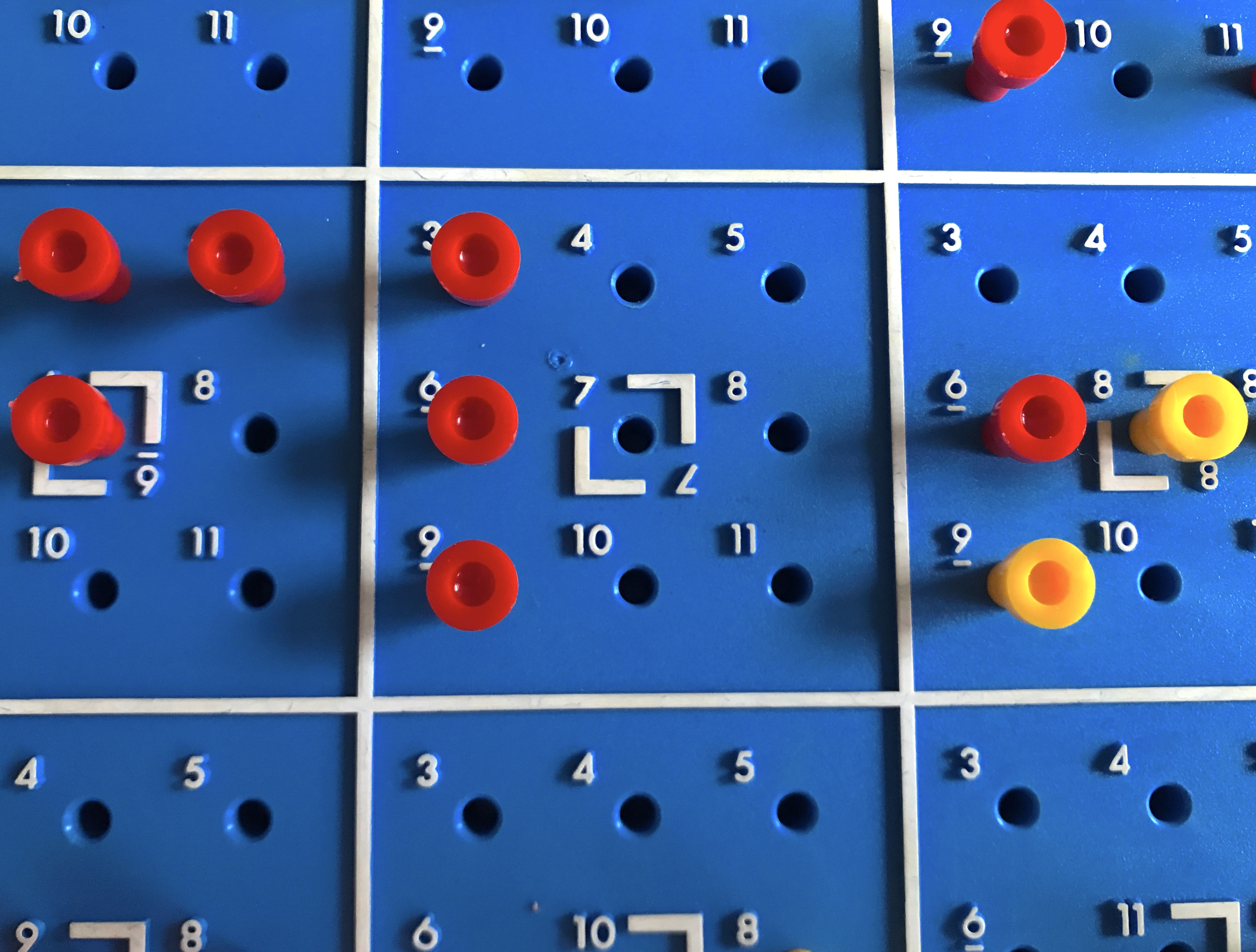 Super 3, MB Spiele 1978